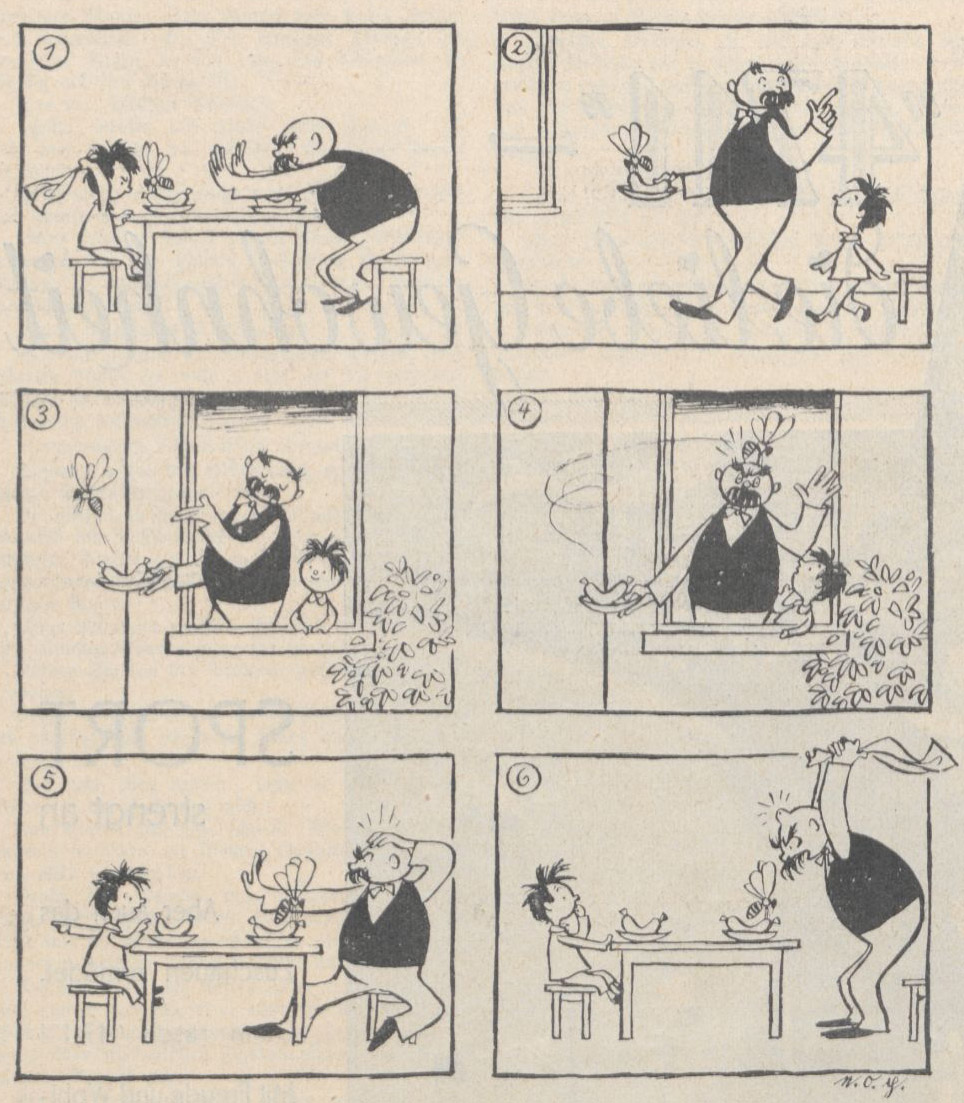 Umgang mit Wespen. Eine Vater-und-Sohn-Bildergeschichte.